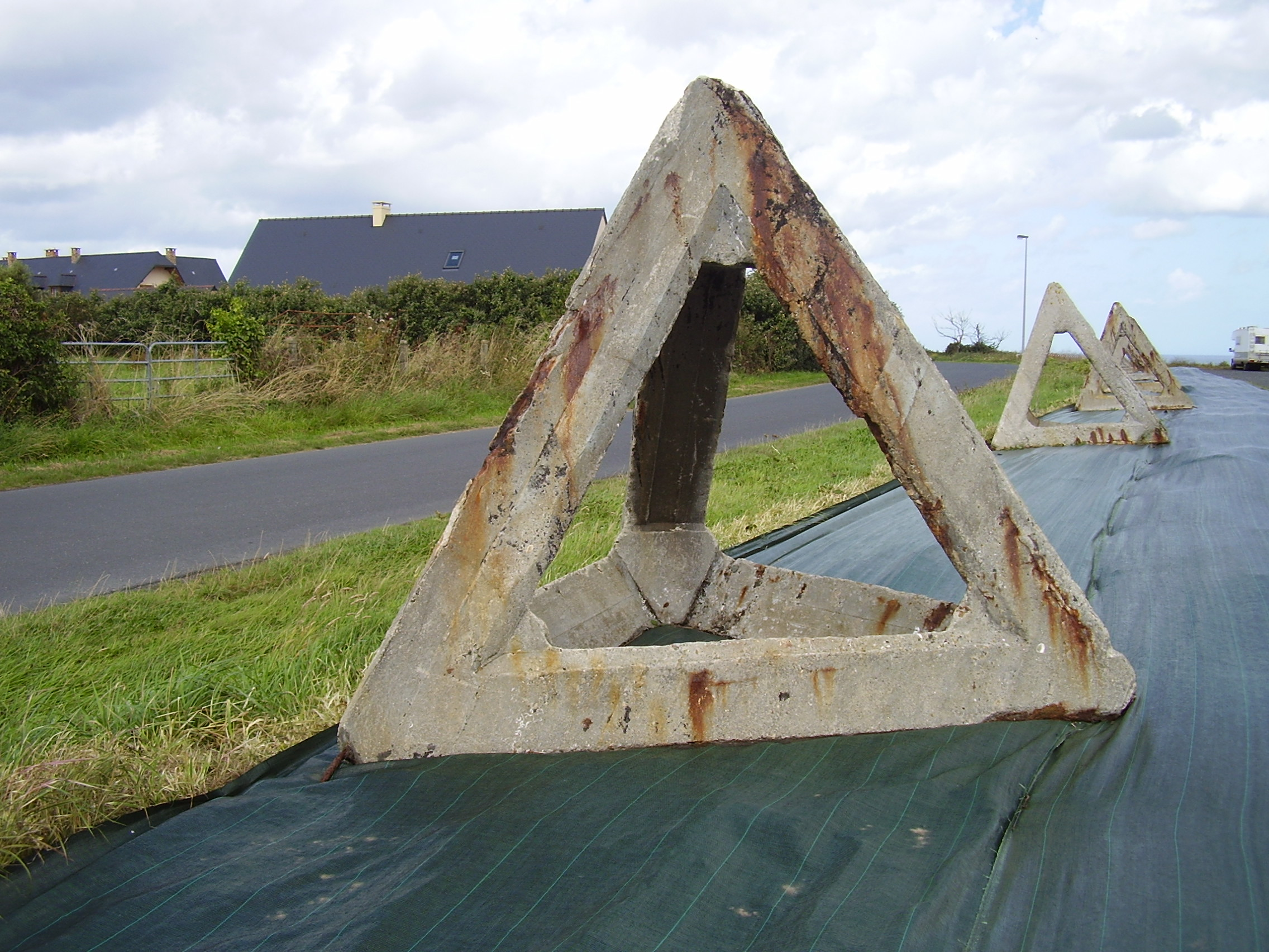 Vierville-sur-Mer; D-day museum; Frankreich